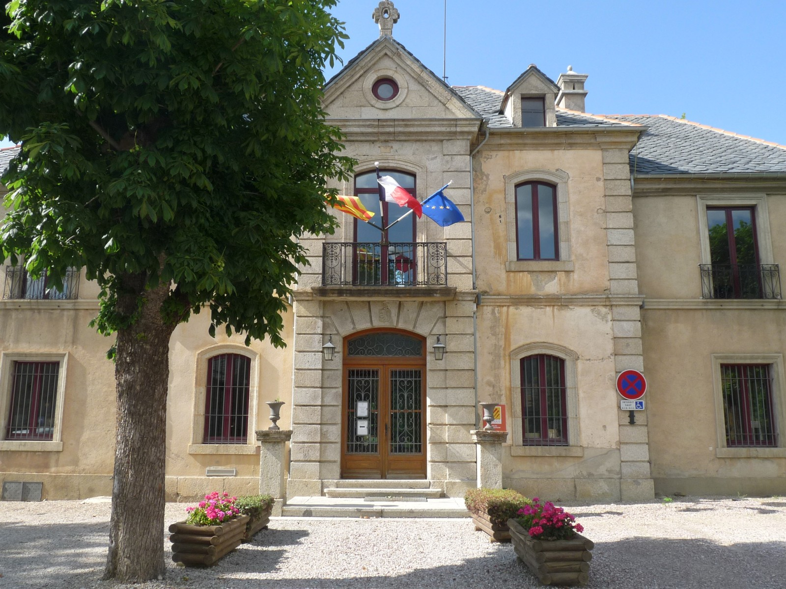 Nouvelle mairie de Palau-de-Cerdagne, Pyrénées-Orientales, France